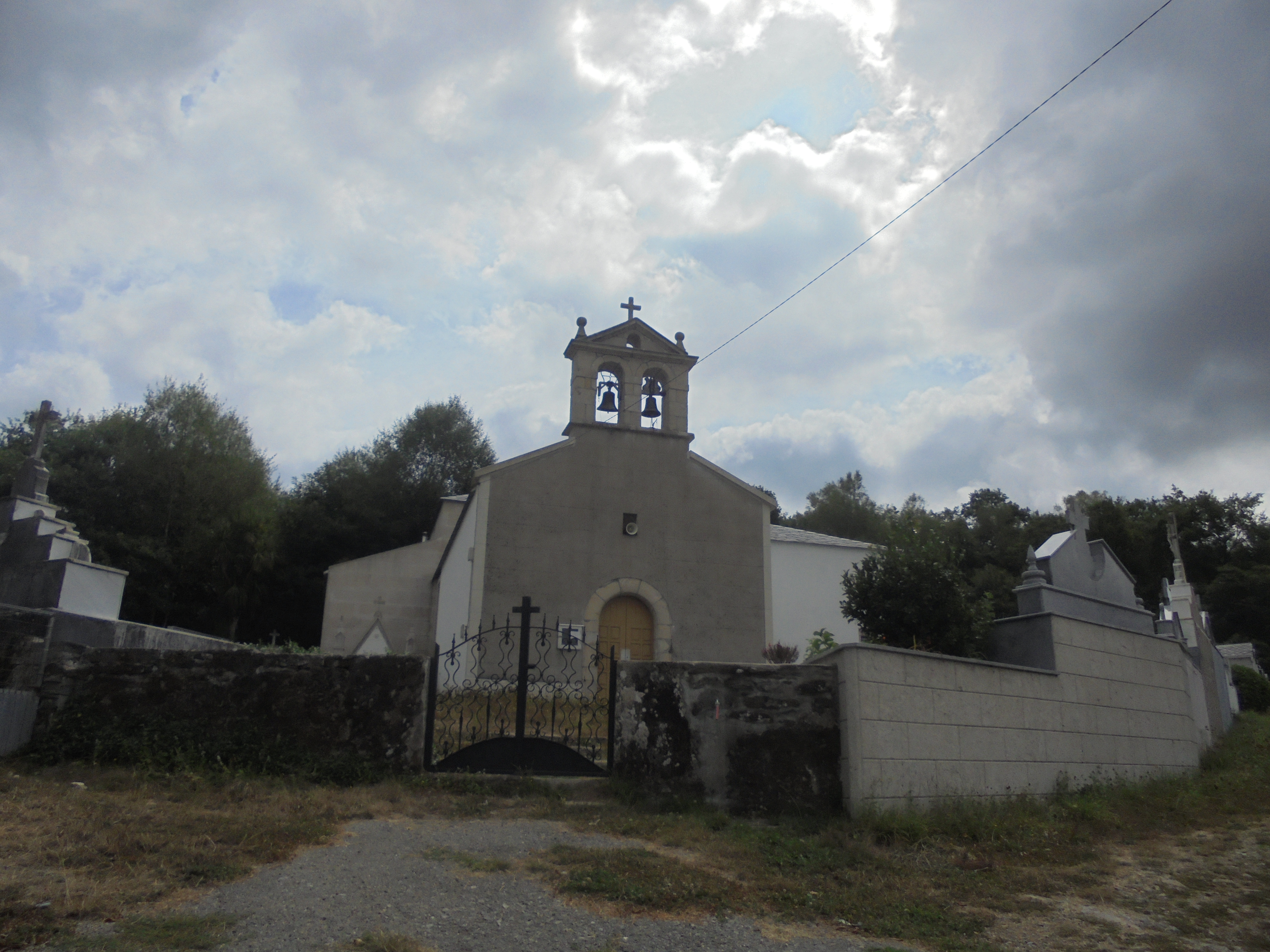 Igrexa parroquial de San Martiño de Folgosa ( O Corgo)